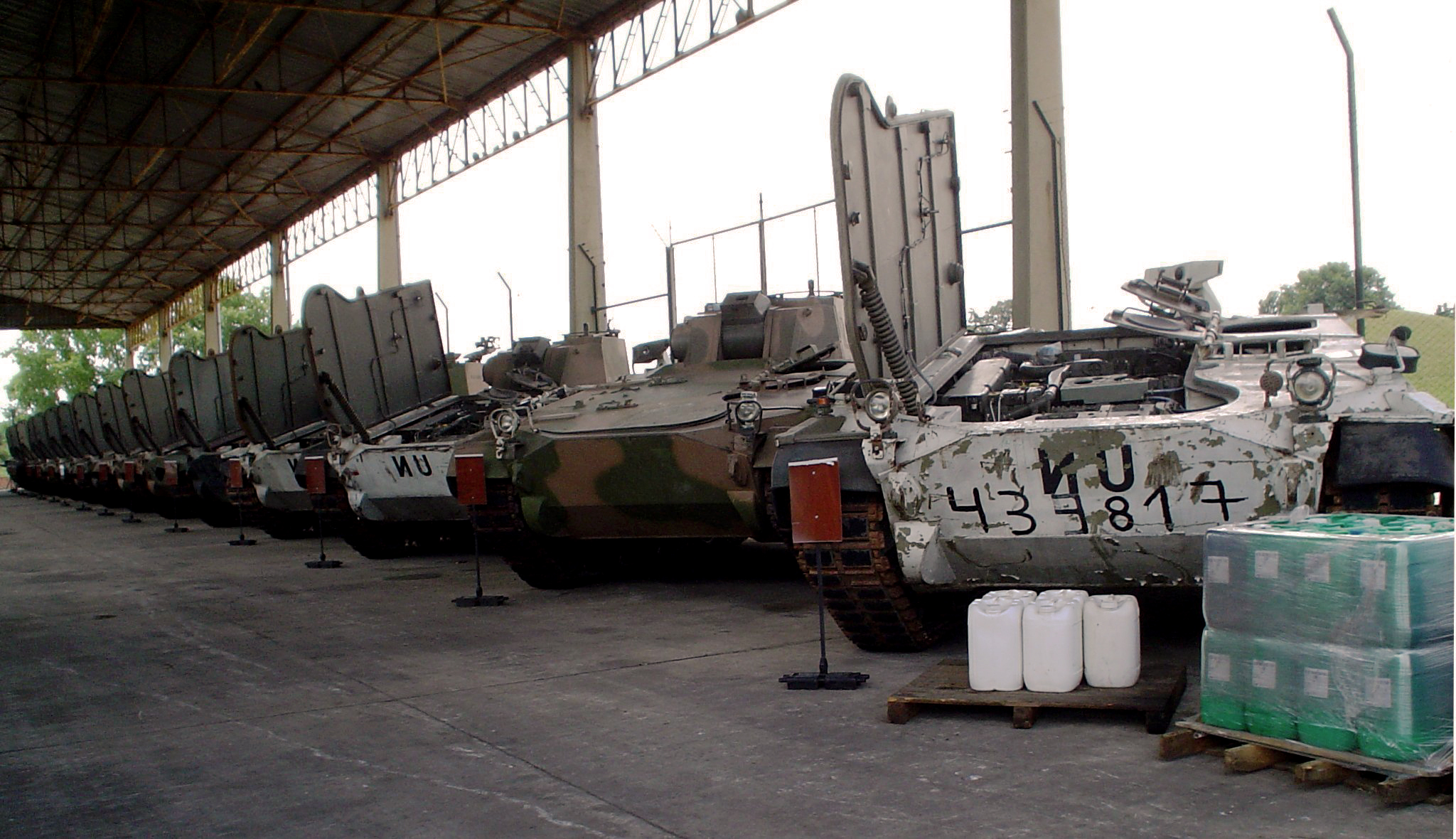 TAM VCTP pintado de blanco, fue en misión de paz a Croacia